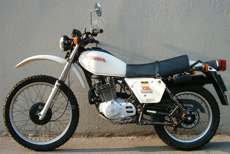 Honda XL500 Modell 1980